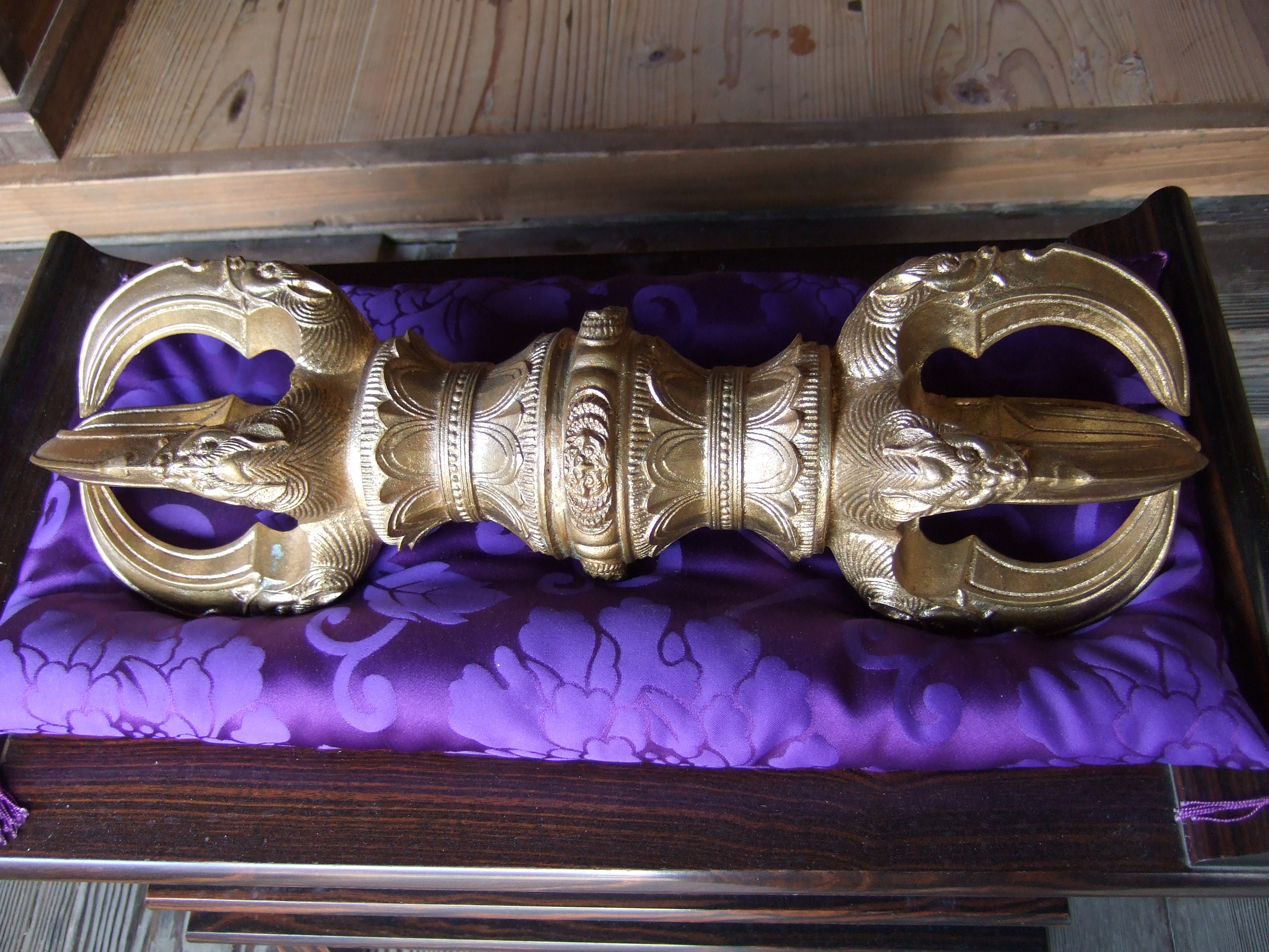 観音正寺